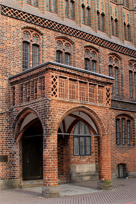 Seiteneingang Altes Rathaus, Hannover